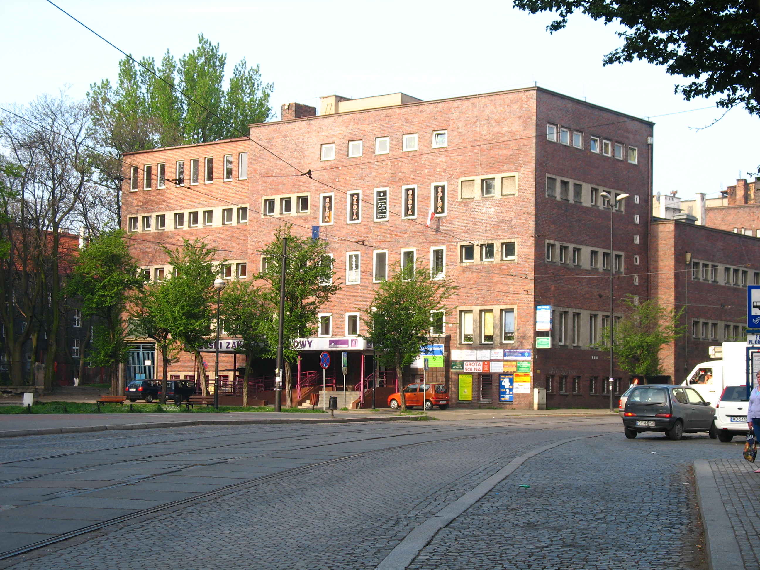 Miejski Zakład Kąpielowy, Zabrze pl. Krakowski 10. Wybudowany w latach 1925-1927.